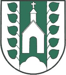 Wappen der ehemaligen Gemeinde Limberg bei Wies, Steiermark